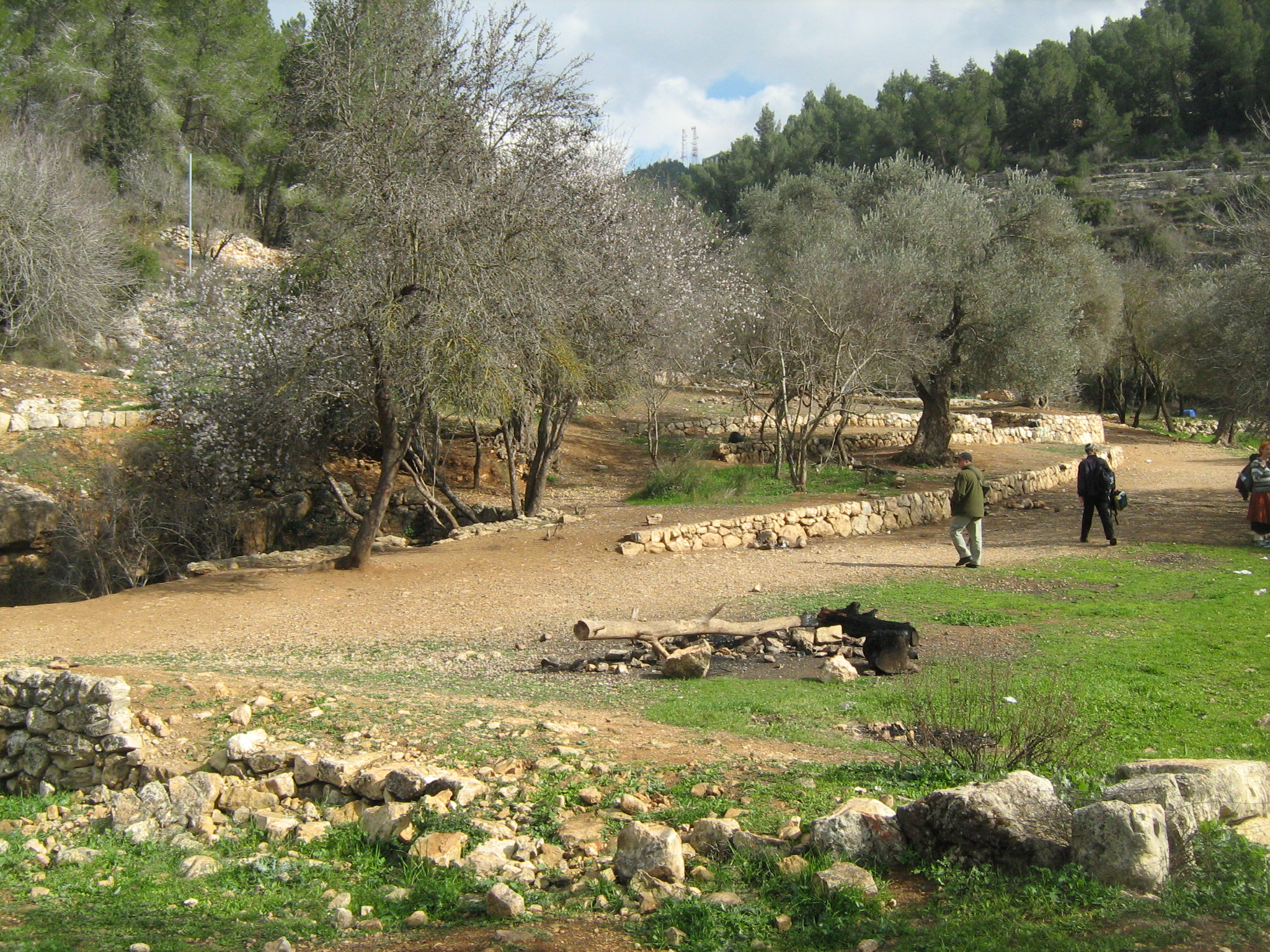 עין חנדק